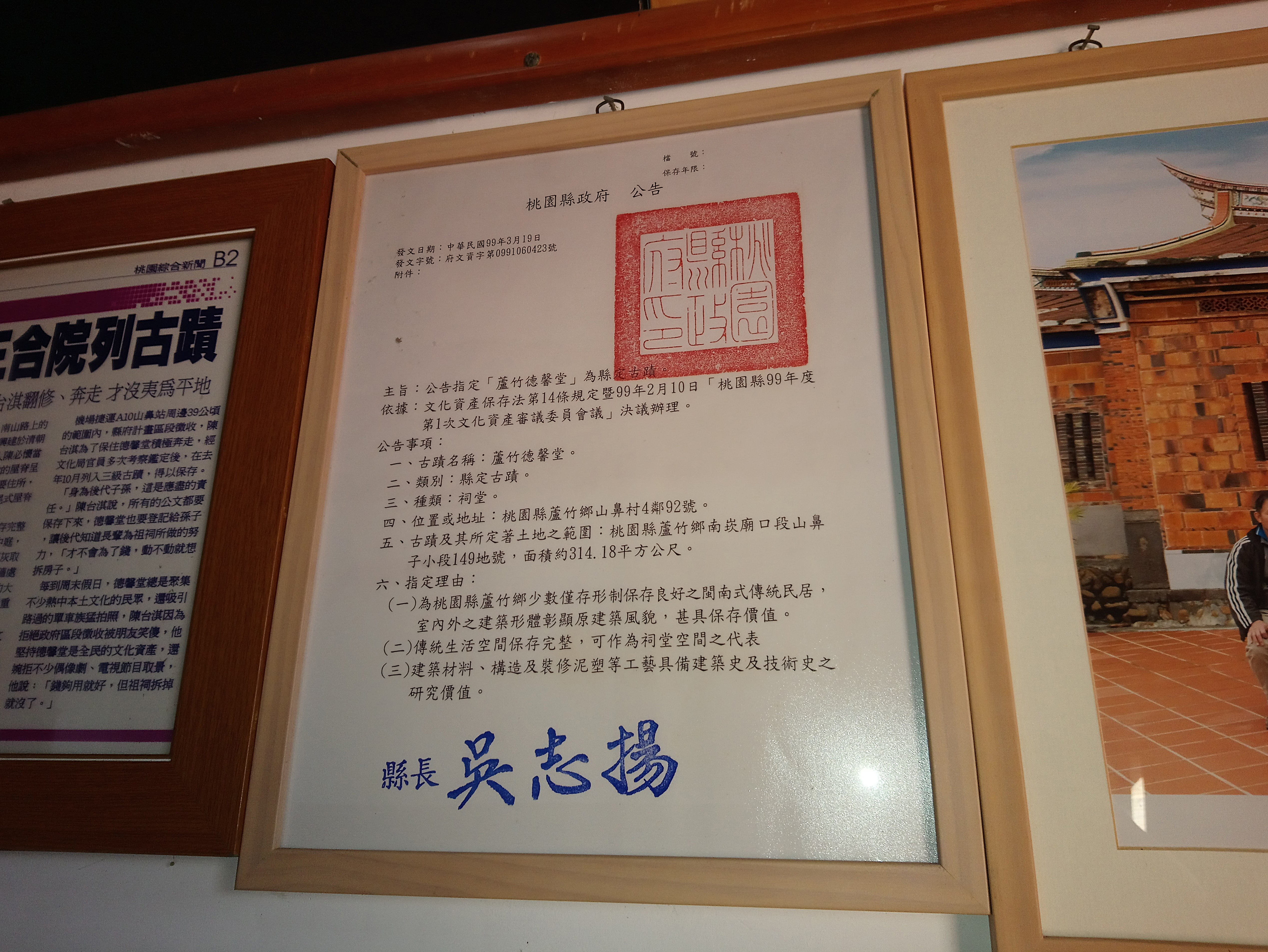 桃園縣政府指定蘆竹德馨堂為縣定古蹟的公告,蓋印桃園縣政府印與桃園縣縣長吳志揚簽字章,桃園市蘆竹區南崁地區山鼻里